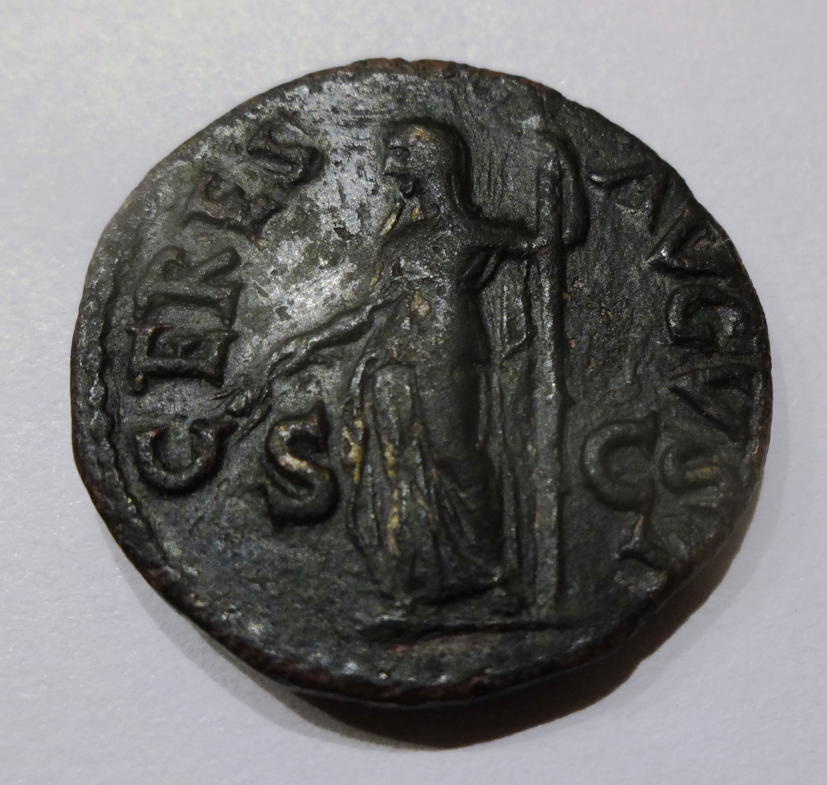 Ceres auf As des Domitianus', Rückseite